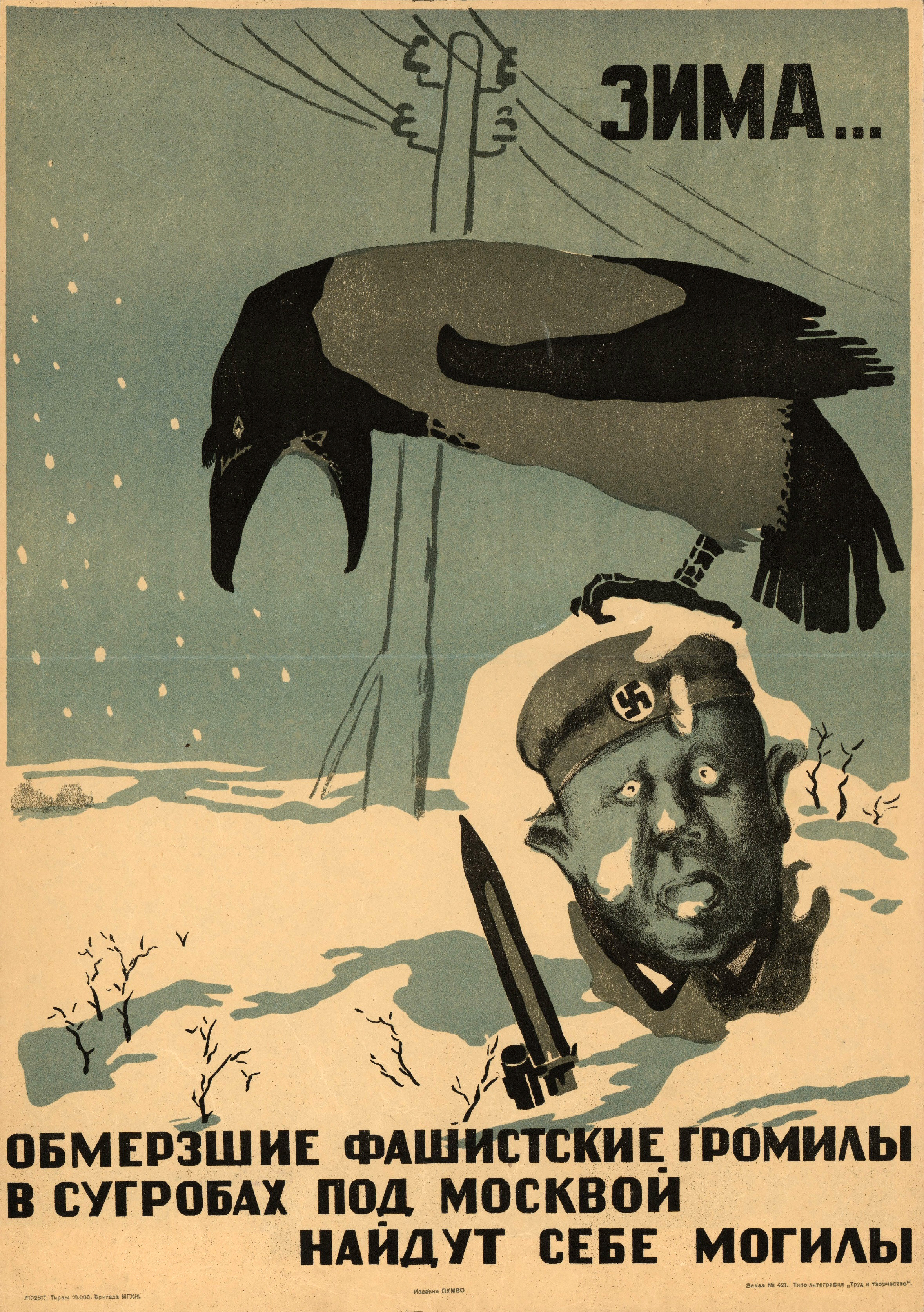 Плакат «Зима... Обмёрзшие фашистские громилы в сугробах под Москвой найдут себе могилы». Москва : ПУМВО, [1941] (Москва : Типолитография «Труд и творчество»). Двухцветная литография, 1 лист, 60,5×45 см, 10 000 экз.